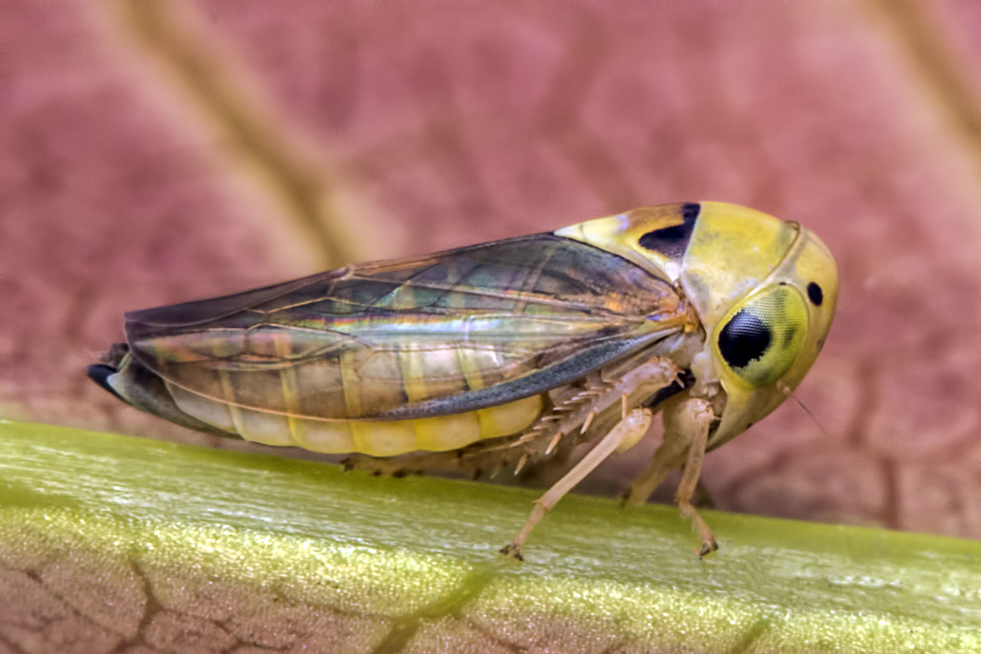 Idioscopus nagpurensis, Family: Cicadellidae